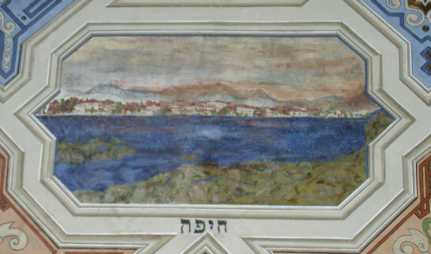 Sceny biblijne na stropie synagogi Kupa w Krakowie